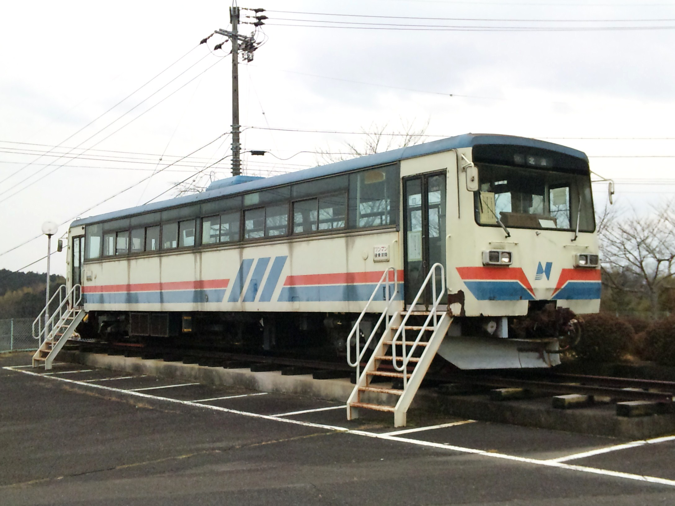 2009年1月23日中池公園で撮影